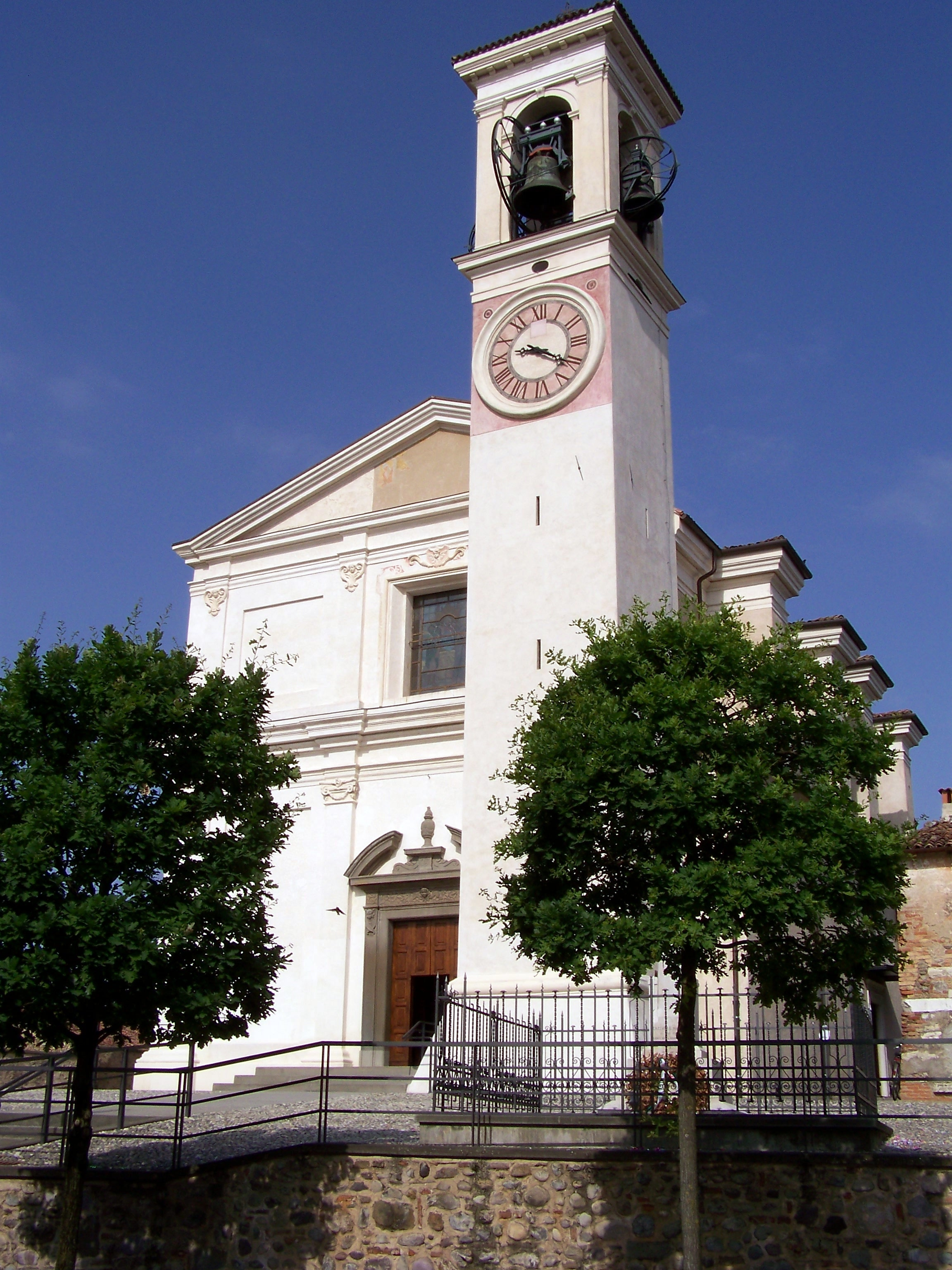 Torre campanaria e parte della facciata d'ingresso della Chiesa parrocchiale di Cazzago San Martino, dedicata alla Natività di Maria Vergine.